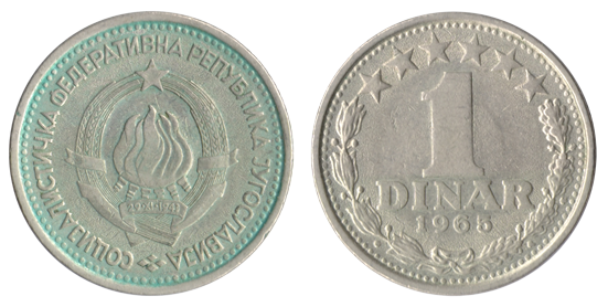 Yugoslav 1 Dinar, 1965